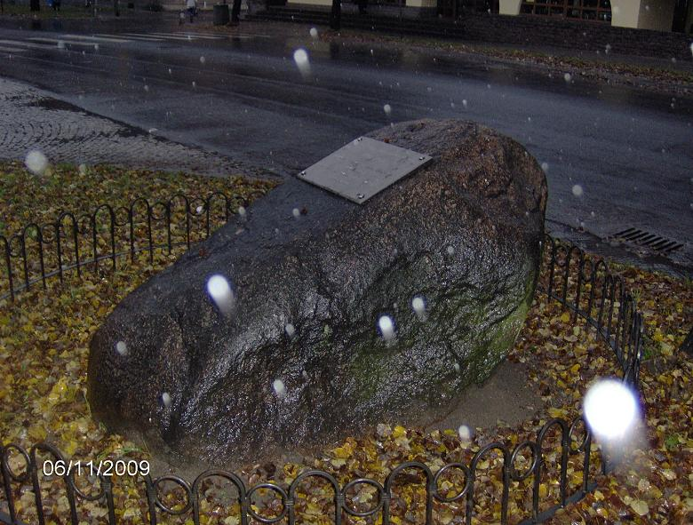 PL